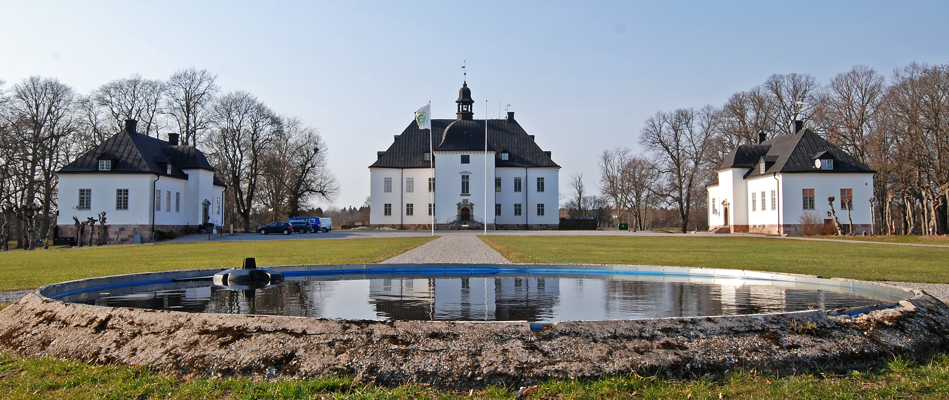 Årsta slott